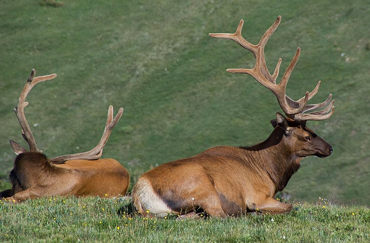 Rocky Mountain Elk